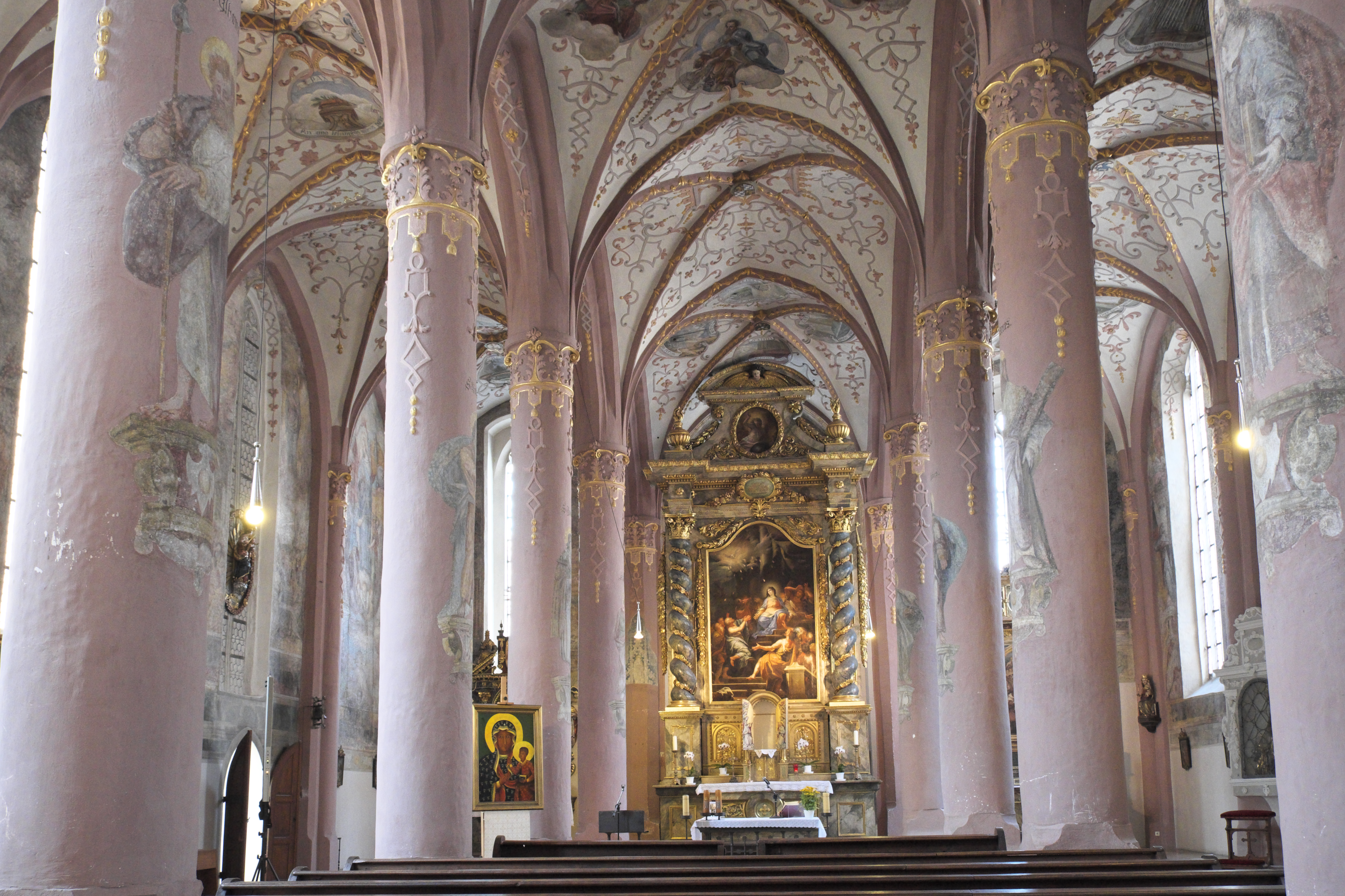 Katholische Spitalkirche Heilig Geist in Ingolstadt (Bayern/Deutschland), Innenraum